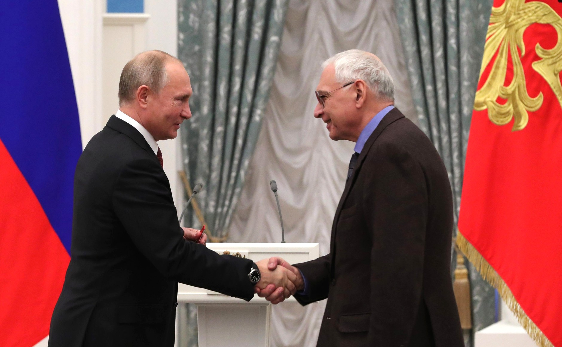 Вручение государственных наград. Орденом Александра Невского награждён генеральный директор киноконцерна «Мосфильм» Карен Шахназаров.